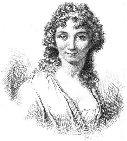 Isabella Teotochi Marin Albrizzi (1760 – 1836), scrittrice italiana, amante delle arti e animatrice di un noto salotto letterario.